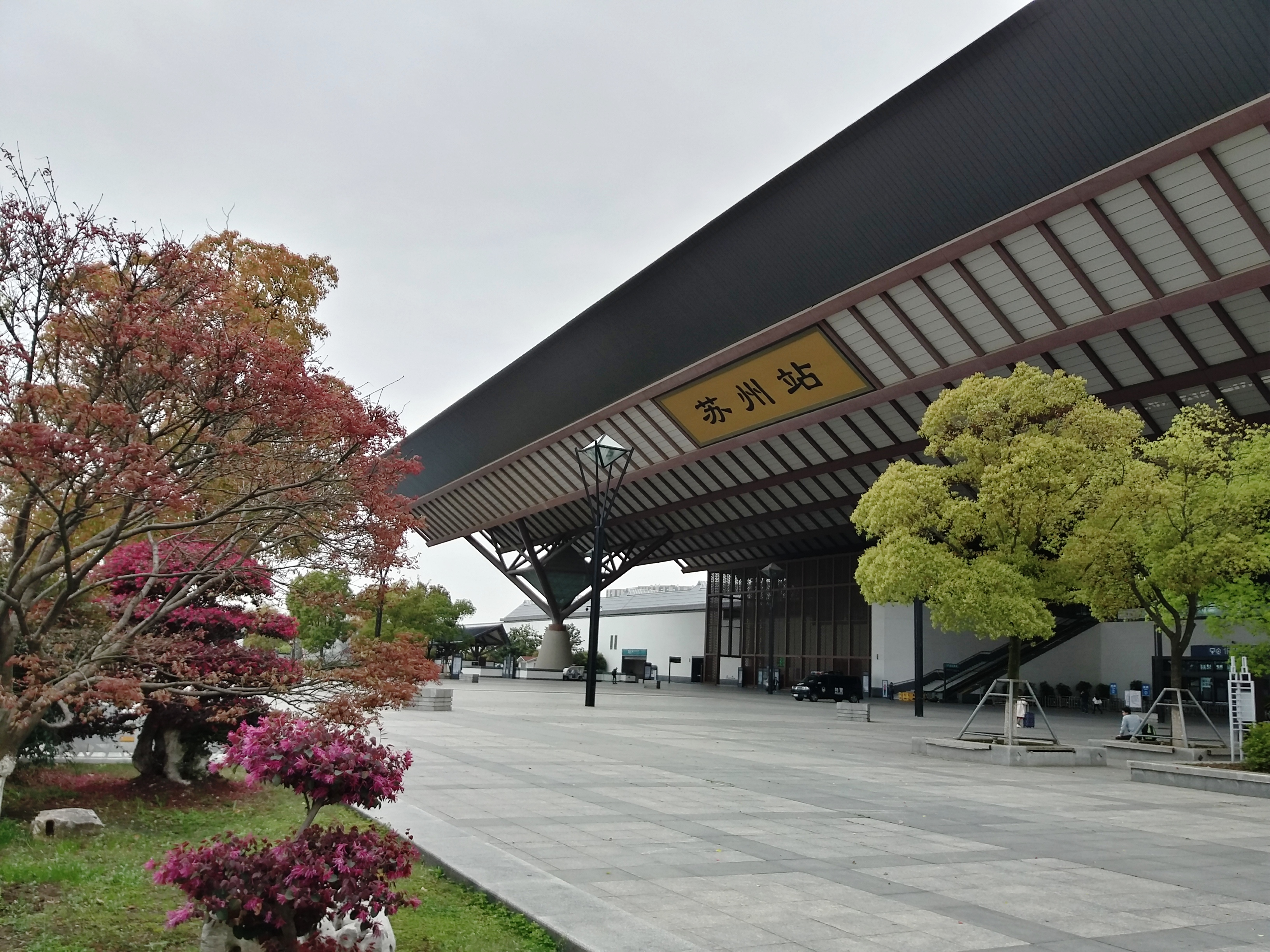 Suzhou Railway Station (Jiangsu)